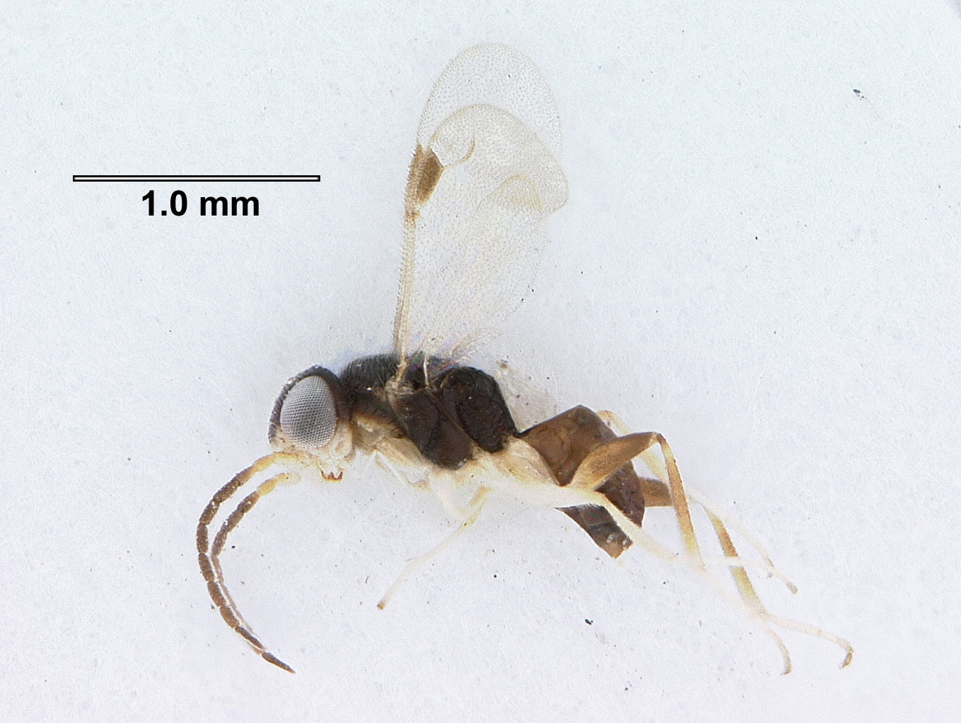 Dryinidae